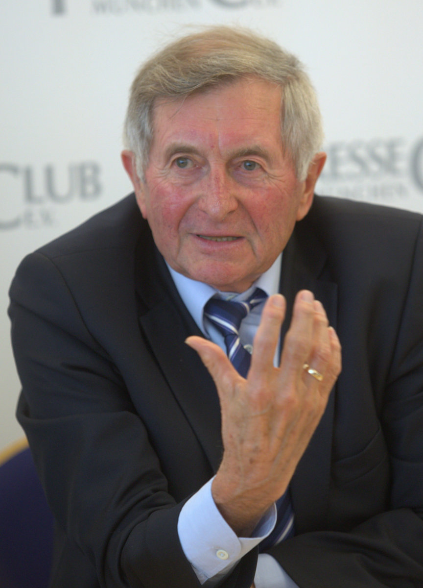 Alois Glück, deutscher Politiker (CSU). Hier am 18. Mai 2017 während einer Veranstaltung im Münchner PresseClub. Titel des Werks: "Alois Glück (2017)"